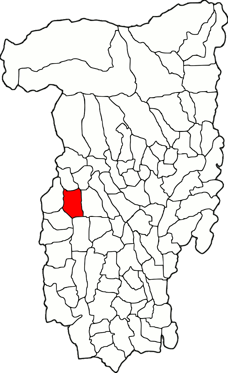 Lage der Stadt Berbești im Kreis Vâlcea (RO).